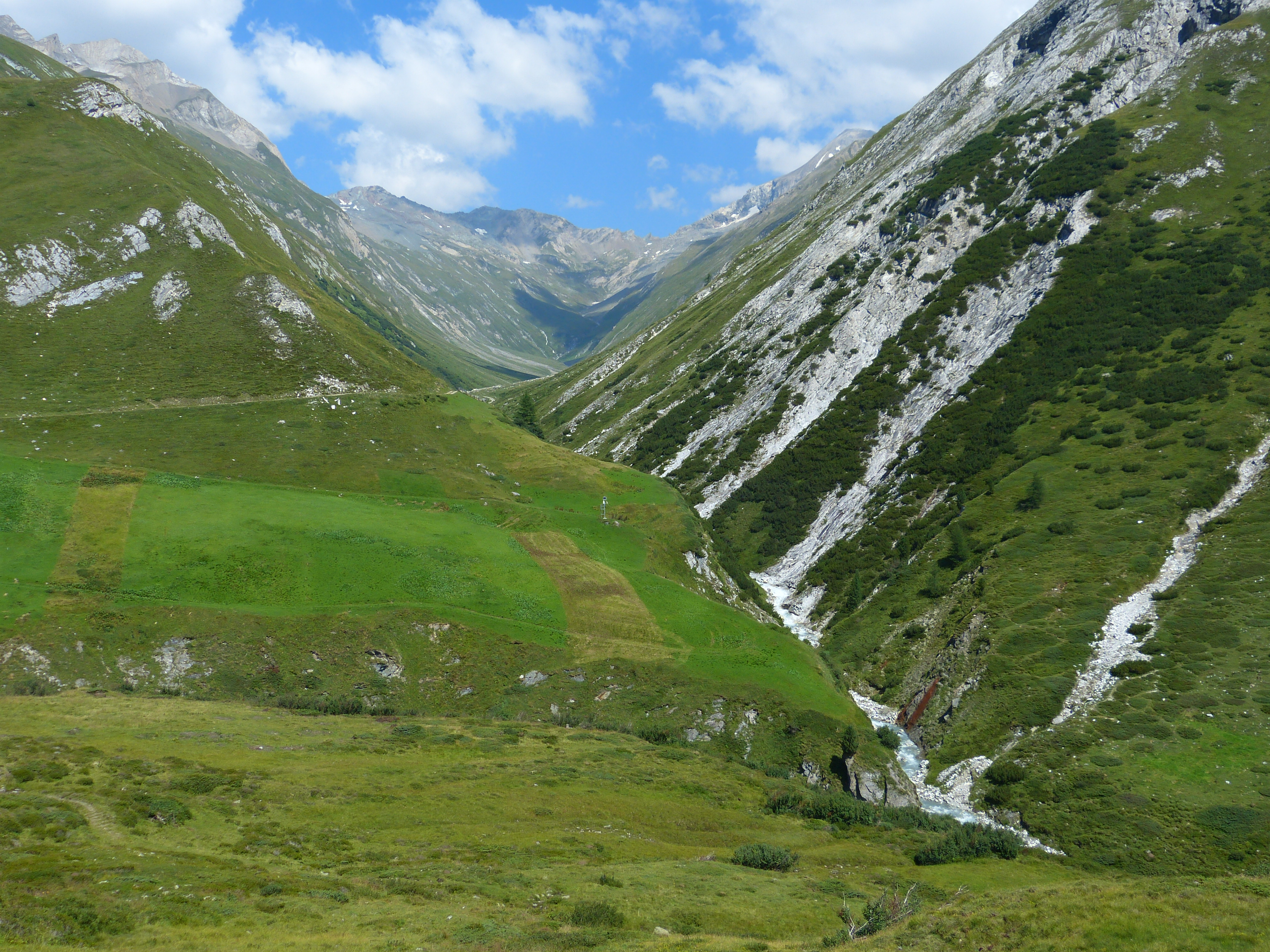 Blick ins Schwarzachtal, beim Zusammenfluss von Arventalbach und Schwarzach (Isel), Nähe Jagdhausalm, Gemeinde St. Jakob in Defereggen im Hintergrund: Kemater Spitz The making of this work was supported by Wikimedia Austria. For other files made with the support of Wikimedia Austria, please see the category Supported by Wikimedia Österreich.